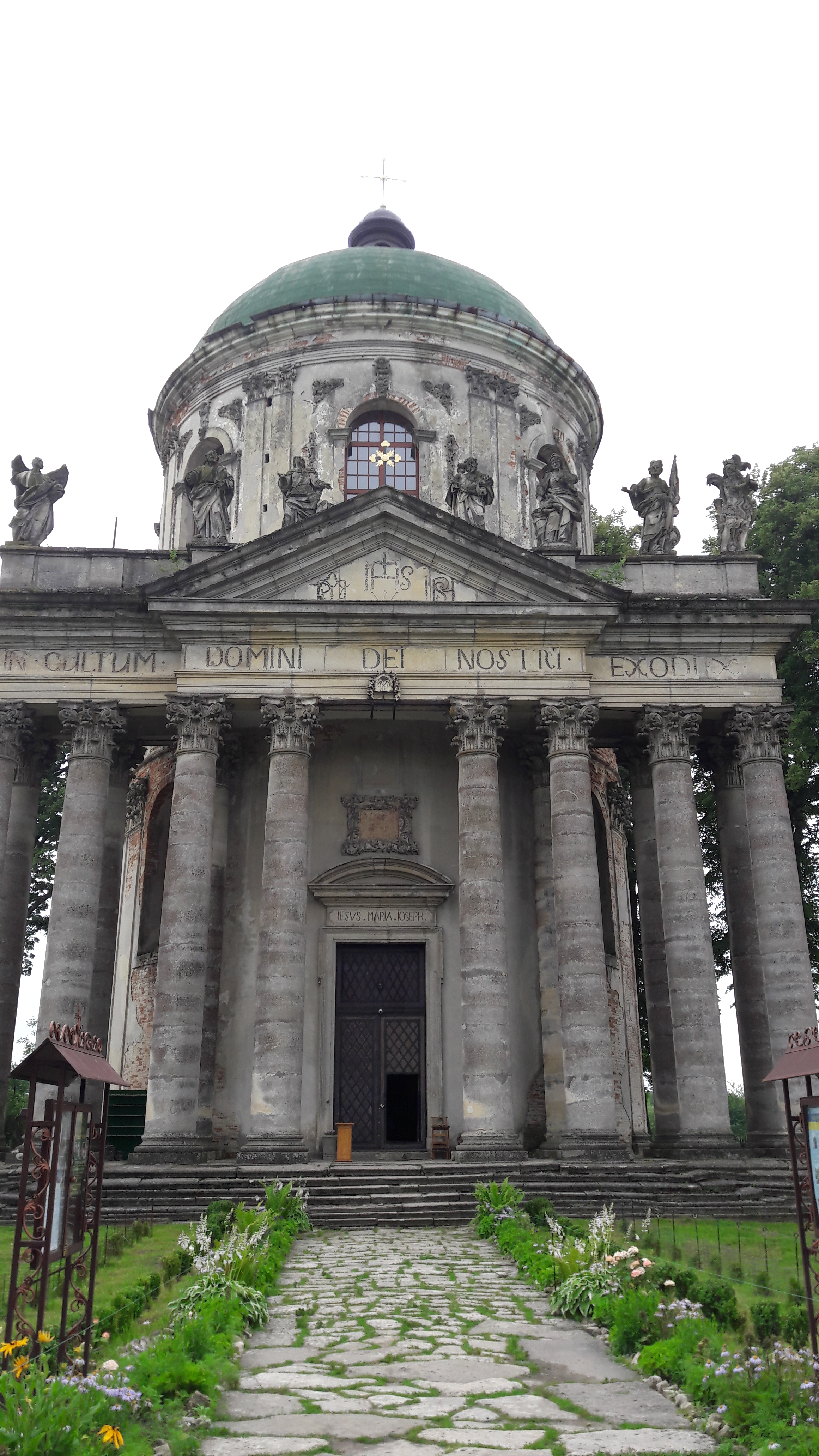 Podhorcų unitų bažnyčia Ukrainoje, Lvovo apskrityje